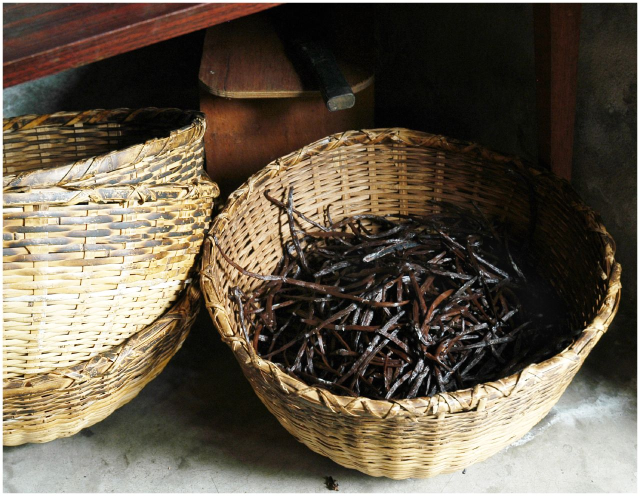 Panier de vanille à La Réunion.